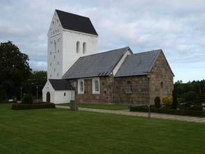 Rind Kirke